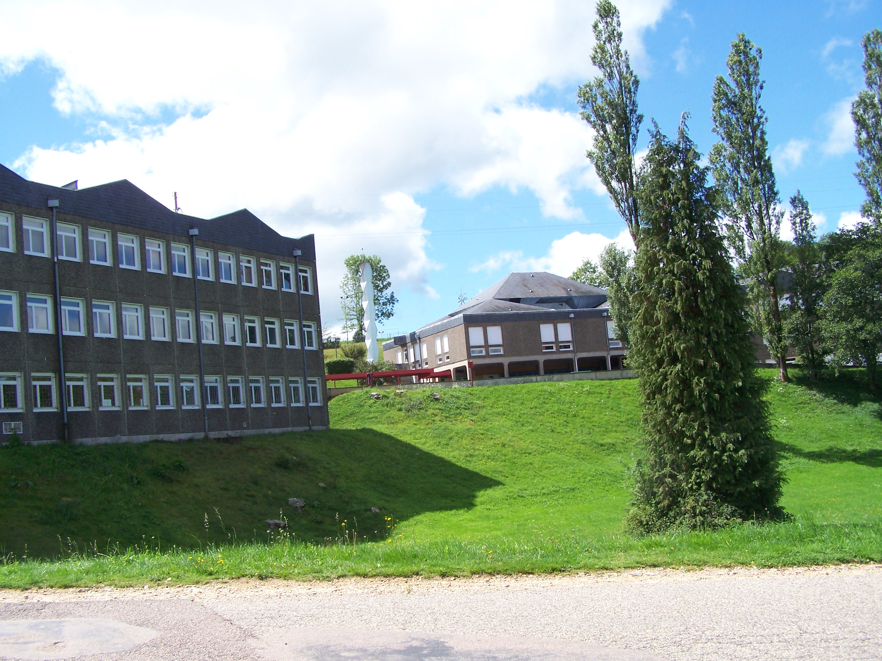 Collège Bibracte de de Château-Chinon (Ville) (Nièvre, France).